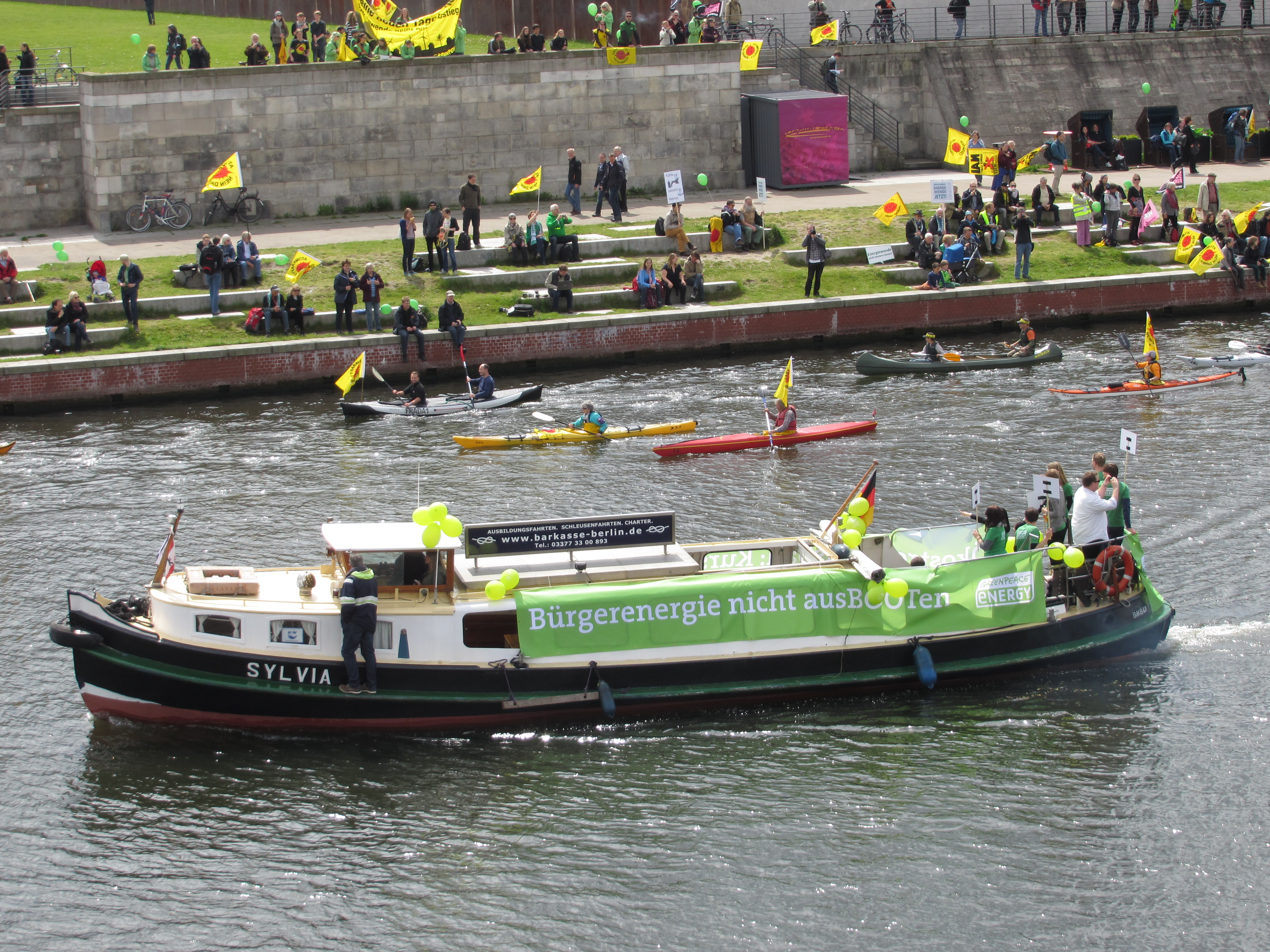 Energiewende-Demo: "Energiewende nicht kentern lassen!"